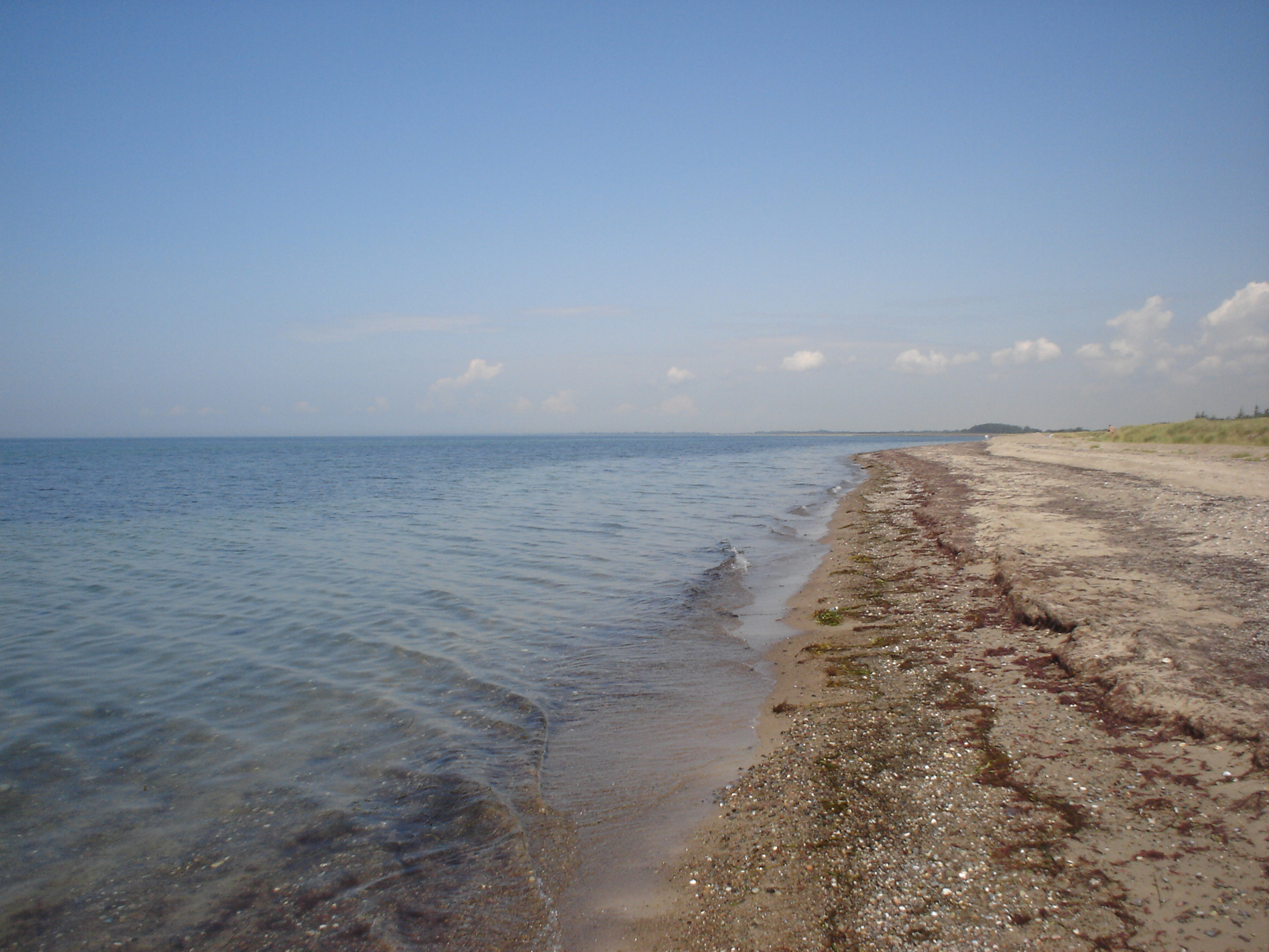 Stranden ved Bredfjed på Lollands sydkyst. Billede taget mod vest ved Dragsminde. I baggrunden Kramnitze.